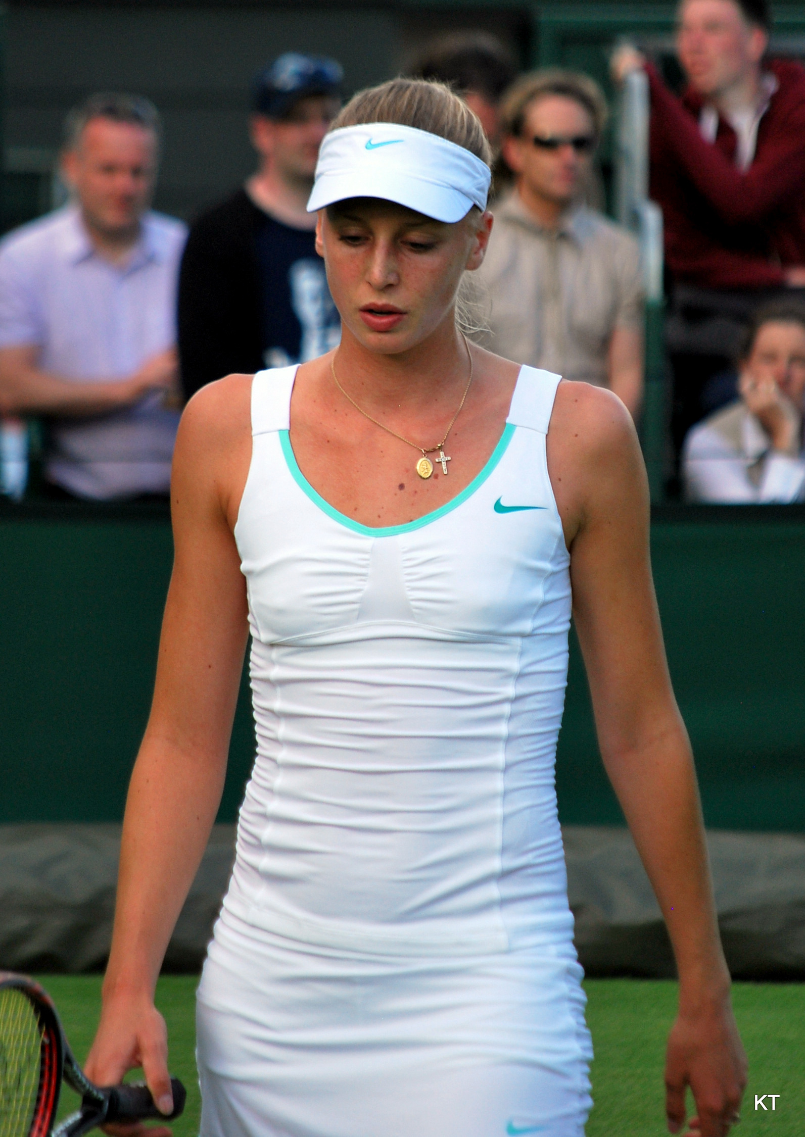 Naomi Broady